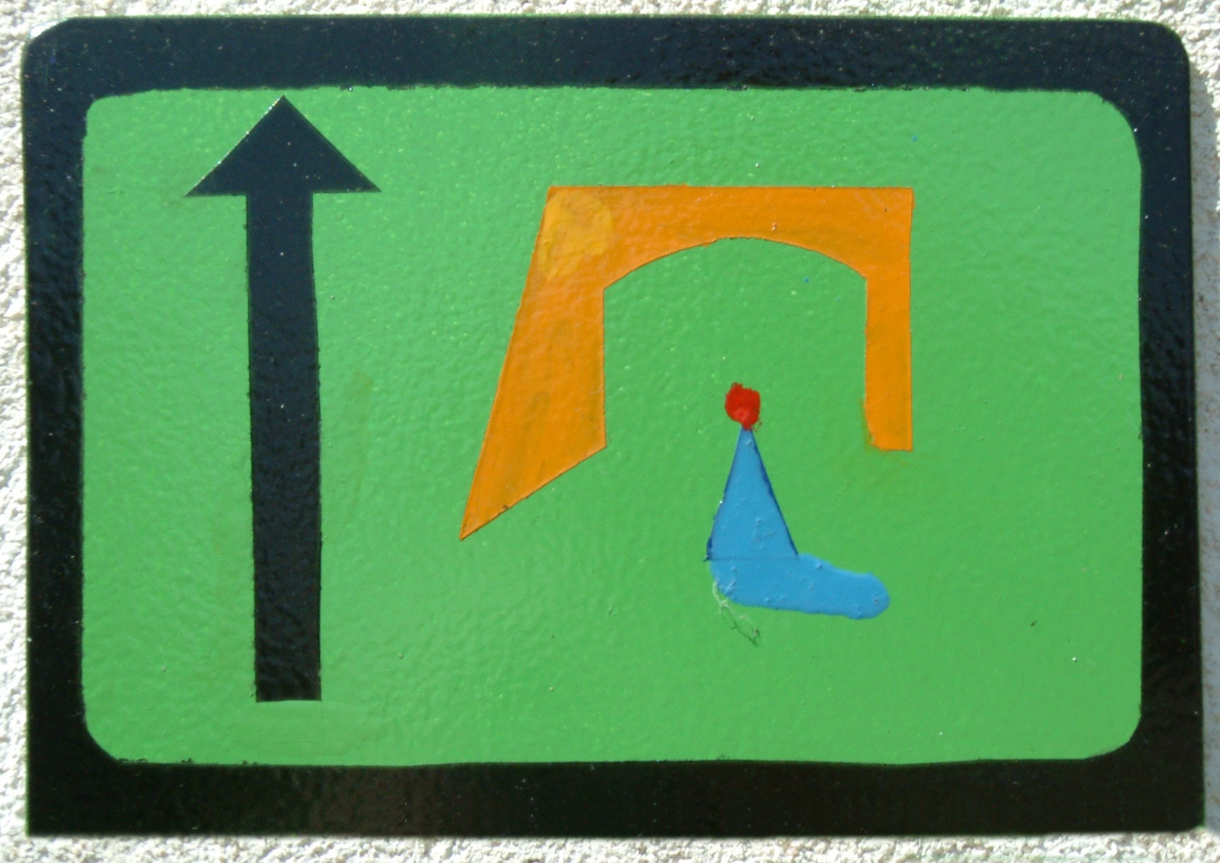 Chorbrünnel-Markierungstafel zu Dirmstein